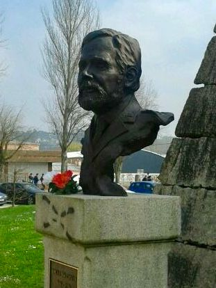 Escultura erigida en Pontevedra en homenaje al General Jar.